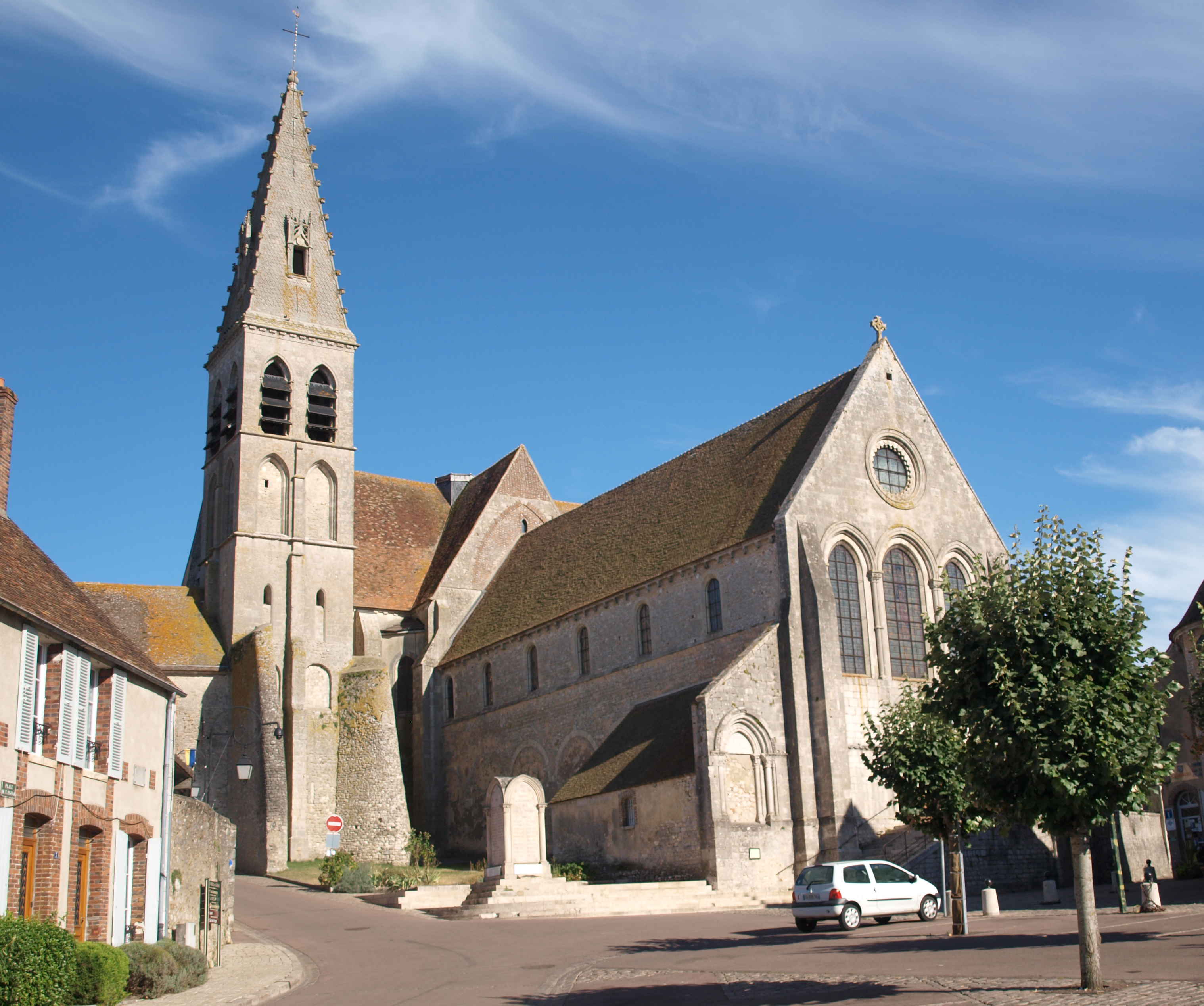 Ferrières-en-Gâtinais (Loiret)